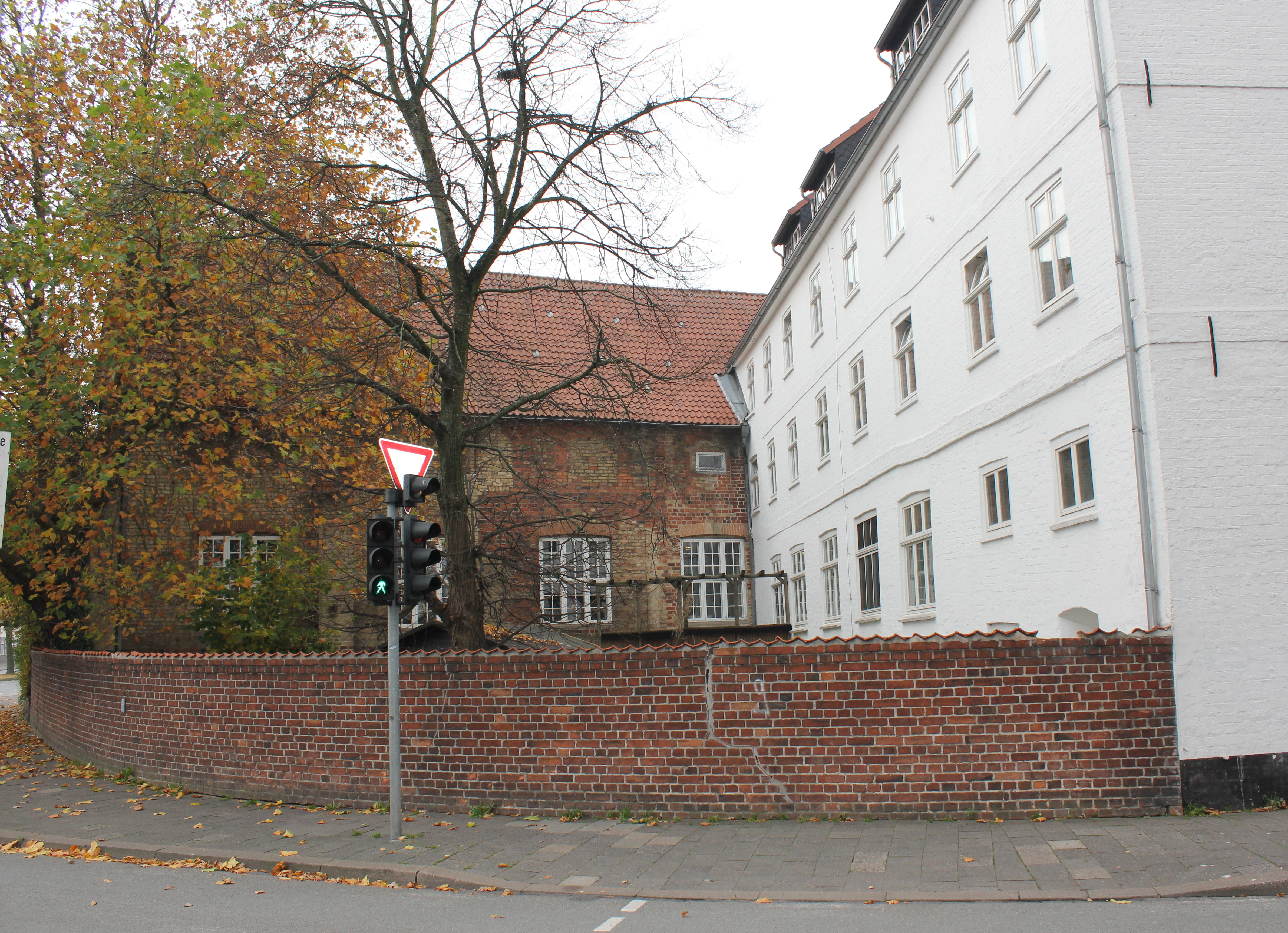 Hospital und Kloster zum Heiligen Geist (Von der Doktor-Todsen-Straße aus gesehen)